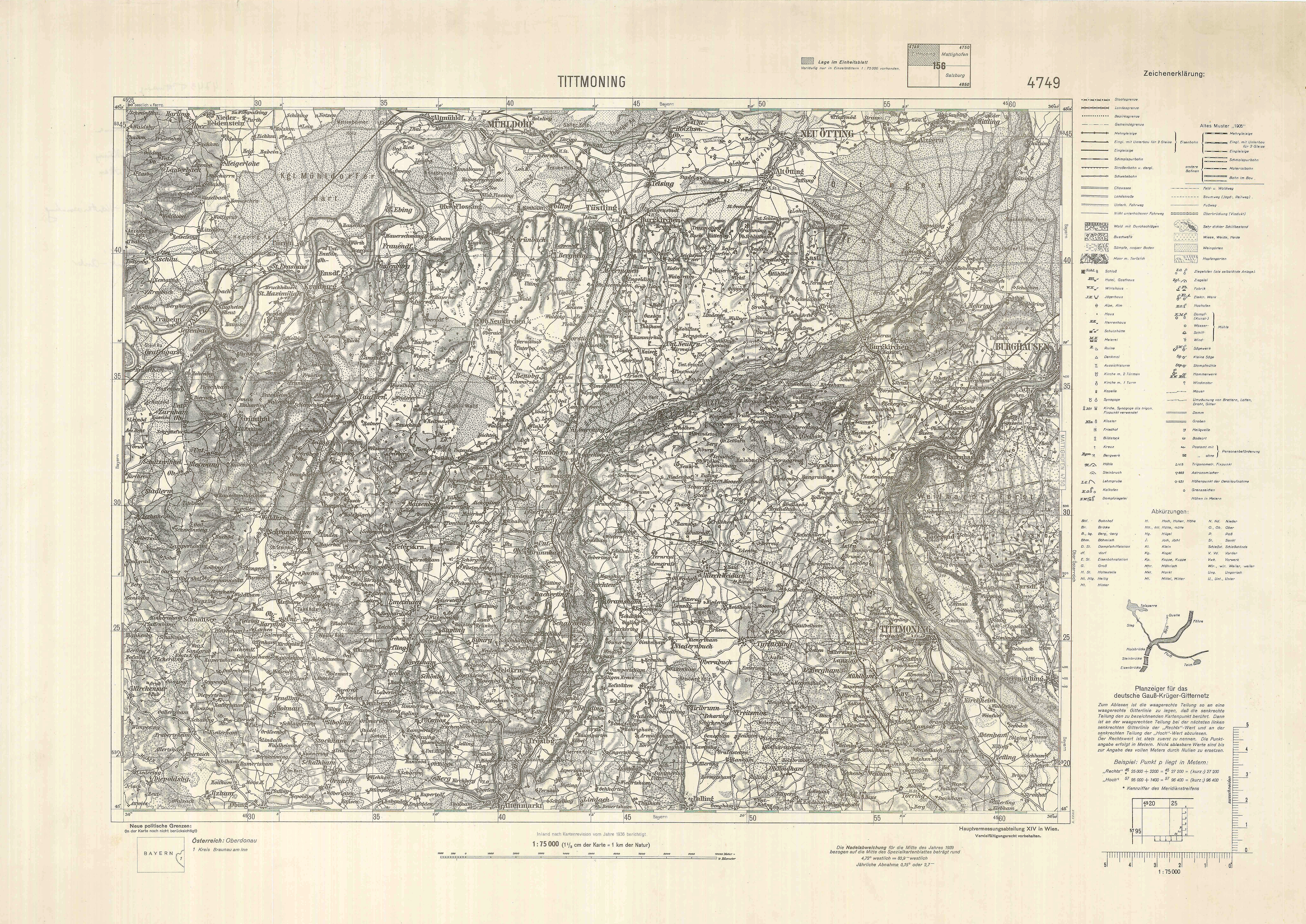 historische Landkarte: Spezialkarte 1:75.000, franzisco-josephinische (3.) Landesaufnahme der österreichisch-ungarischen Monarchie. Blatt 4749 Tittmoning mit Neu und Alt Ötting, Burgkirchen, Burghausen, Ostermiething, Weilharter Forst. Mit Zeichenschlüssel, Nadelabweichung für 1939 und Planzeiger für das deutsche Gauß-Krüger-Gitternetz.